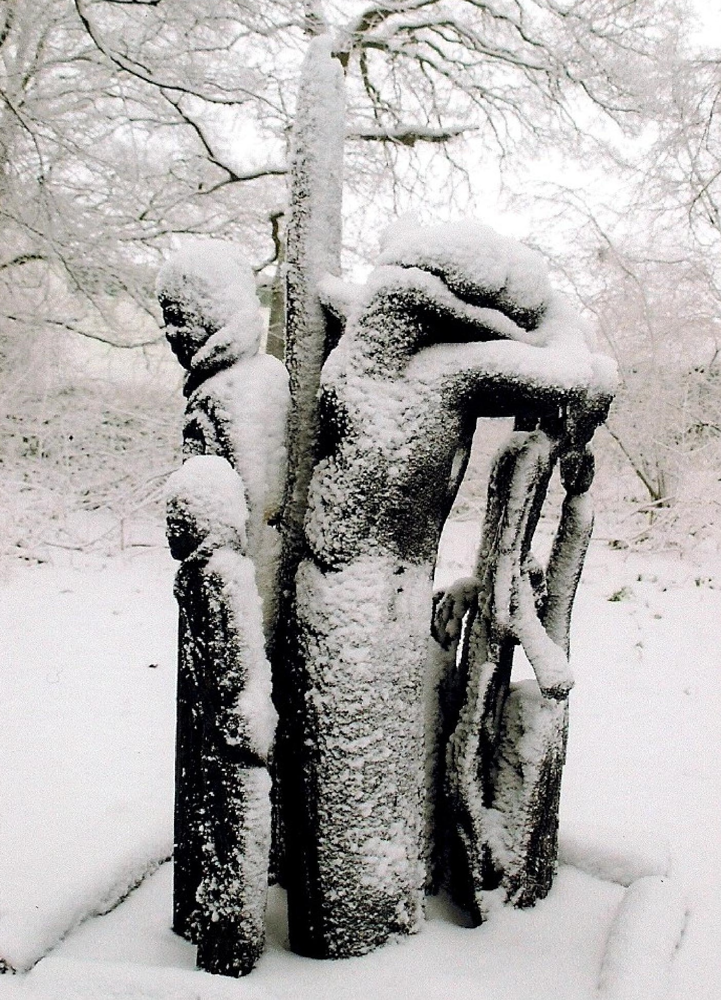 Verschneites Mahnmal aus Mooreiche „Displaced persons“ von Jochen Kusber, Rastede